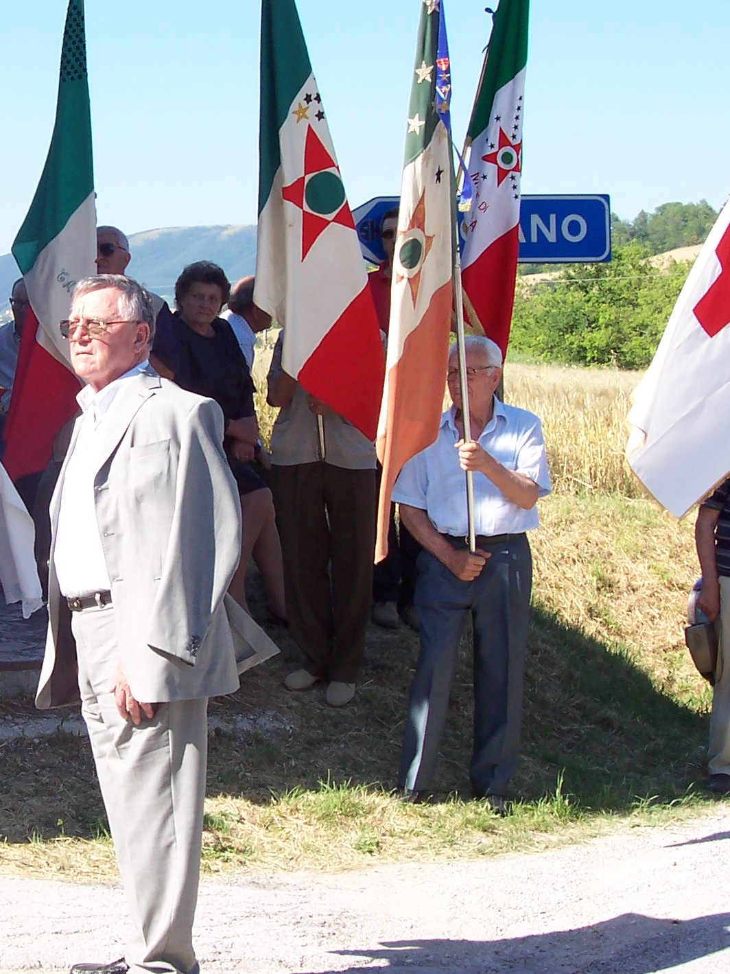 Arcevia maggio 2007, Anniversario dell'eccidio di Monte sant'Angelo.